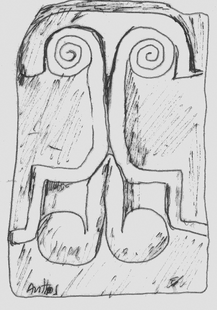 Disegno di porta tombale della cultura di Castelluccio